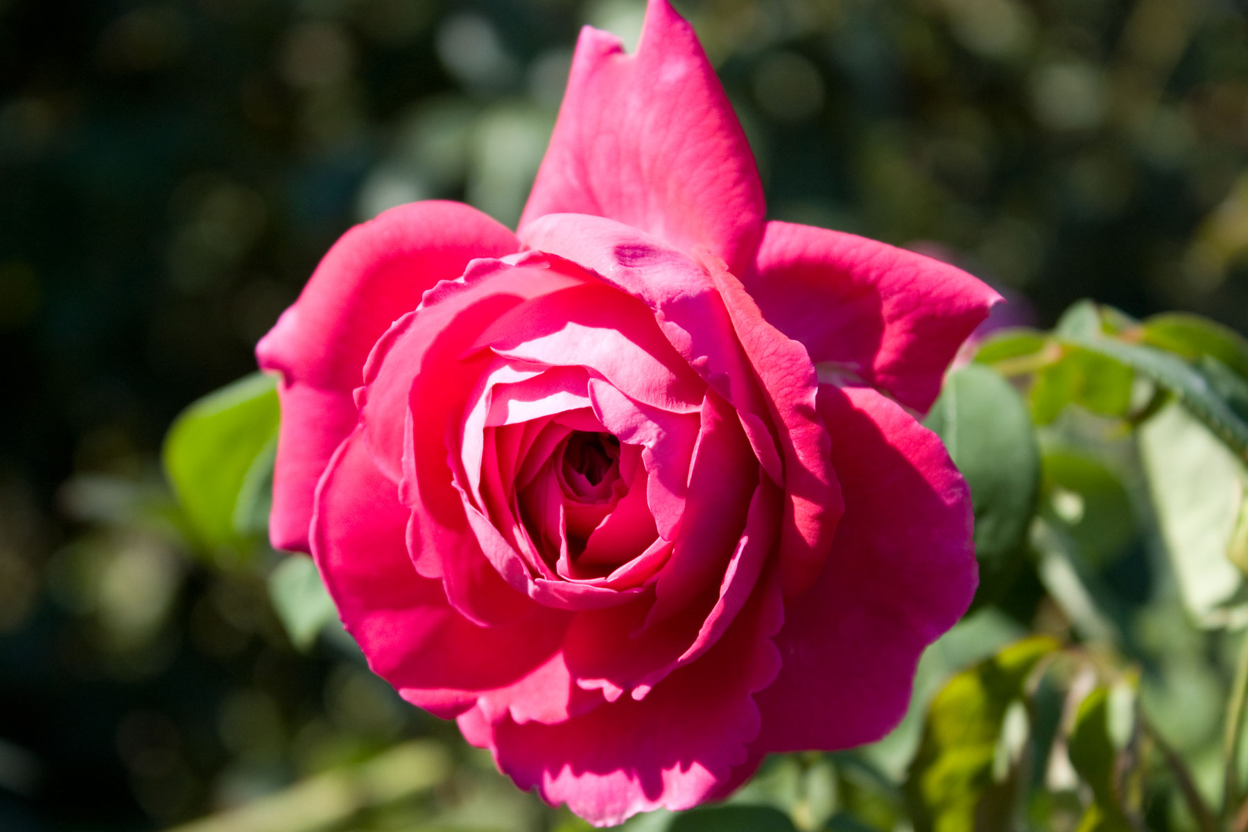 David Austin